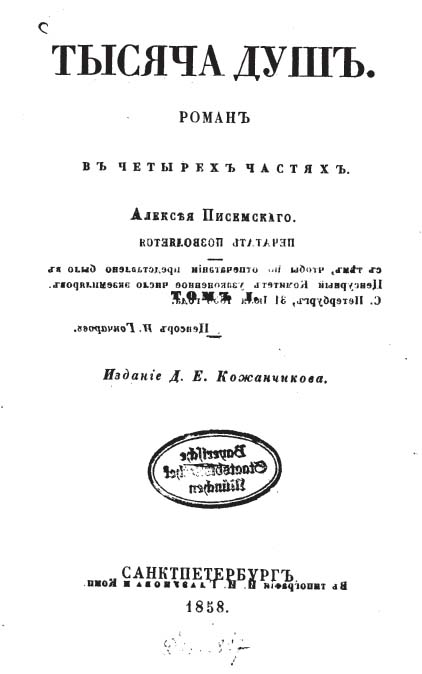 Титульная страница первого издания романа "Тысяча душ"